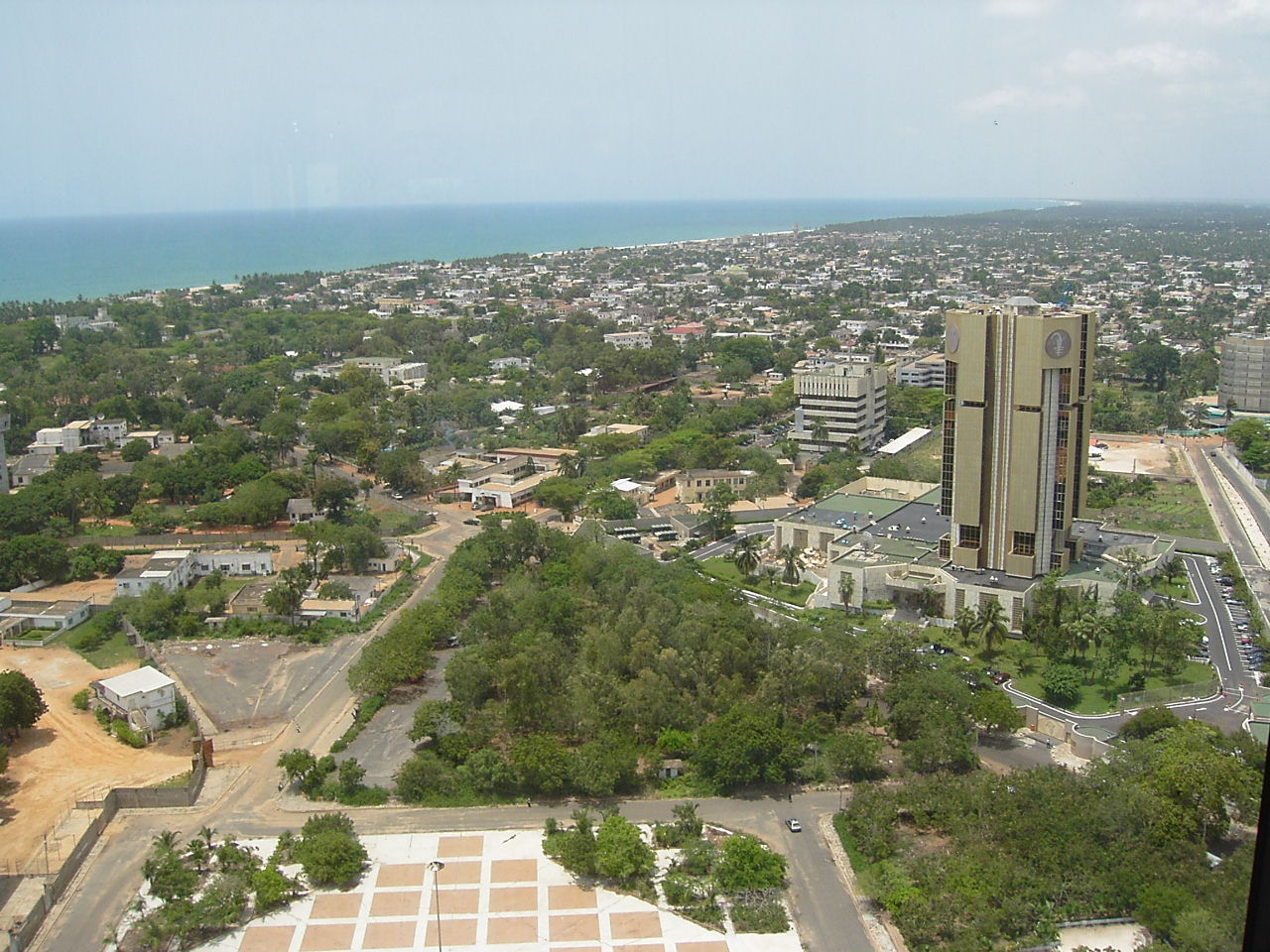 Partie assez verte et aéré de la capitale, les zones d'habitations sont beaucoup plus denses This is an image of music and dance from Togo